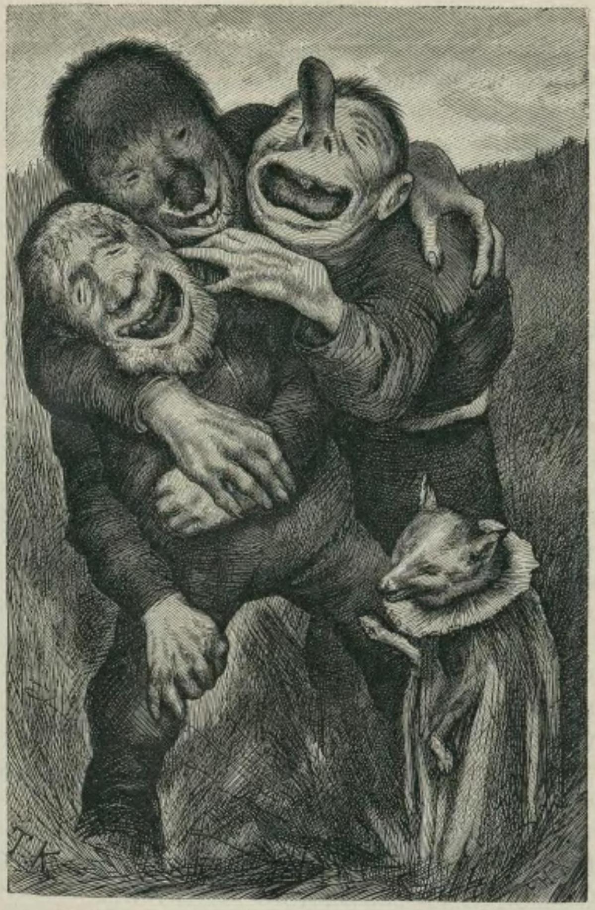 Sagobok för barn